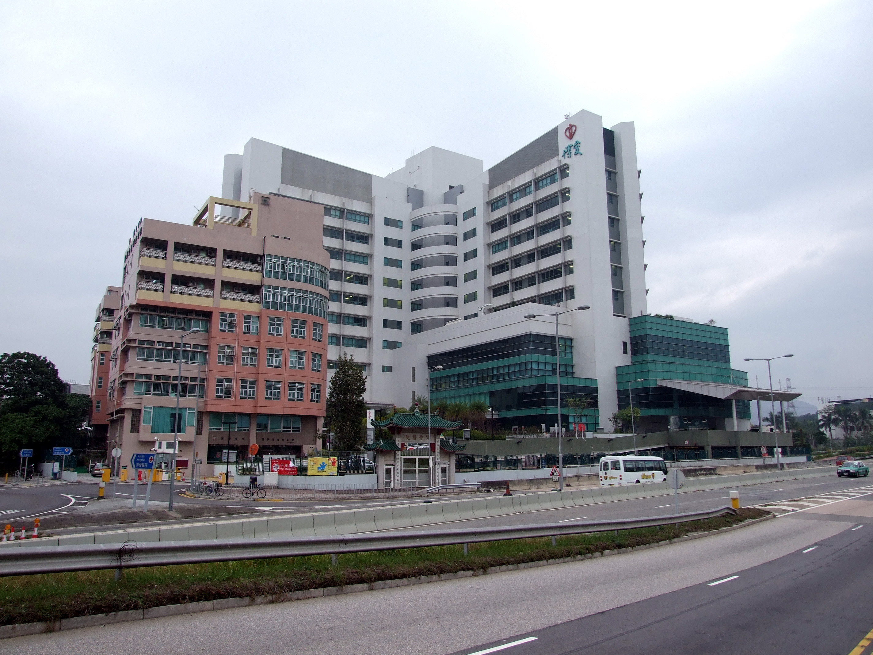 中文（香港）: 博愛醫院